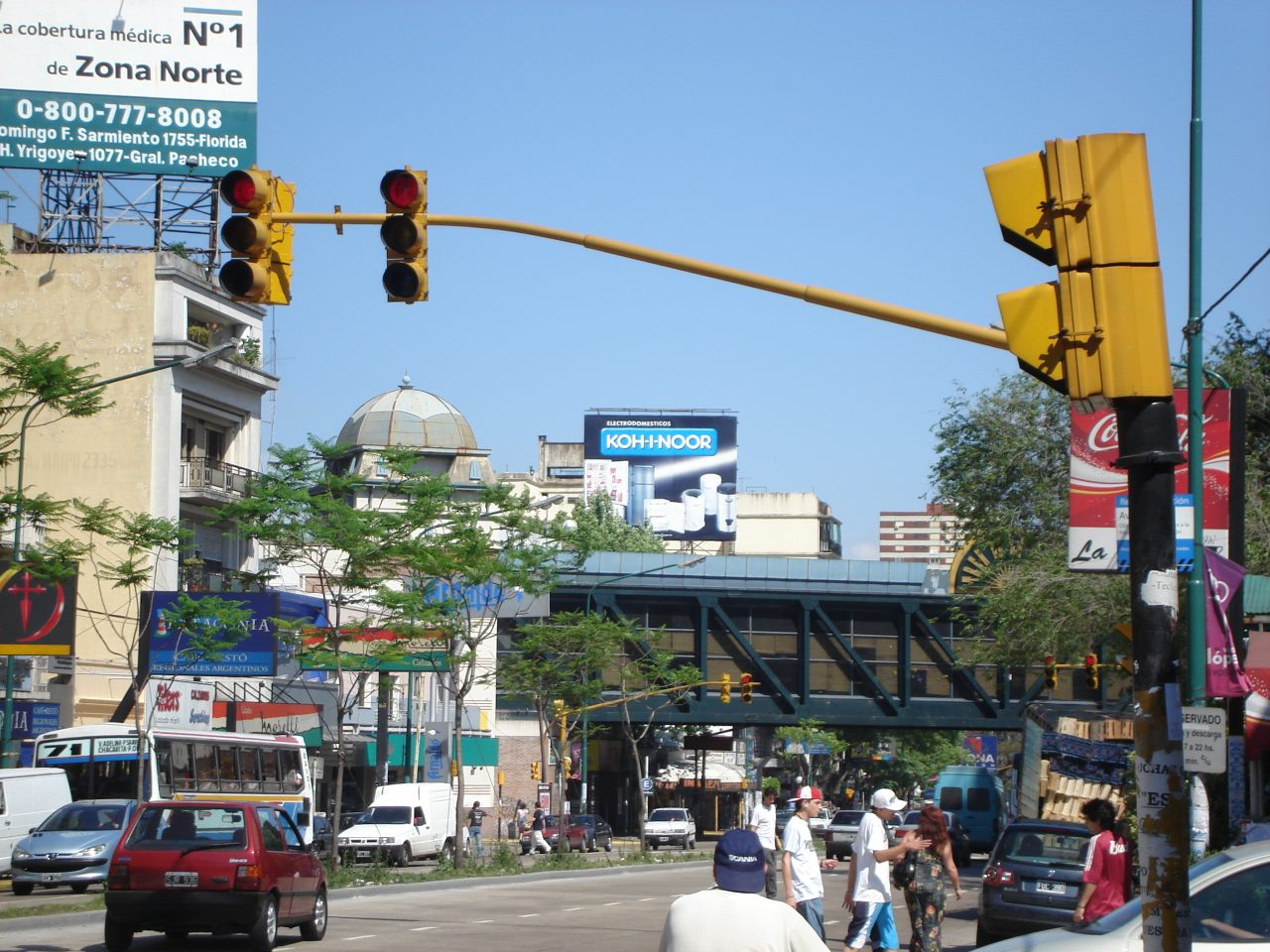 Vista de la Avenida Maipú al 2300, en su intersección con la Avenida Ugarte del barrio de Olivos, partido de Vicente López, provincia de Buenos Aires, República Argentina.